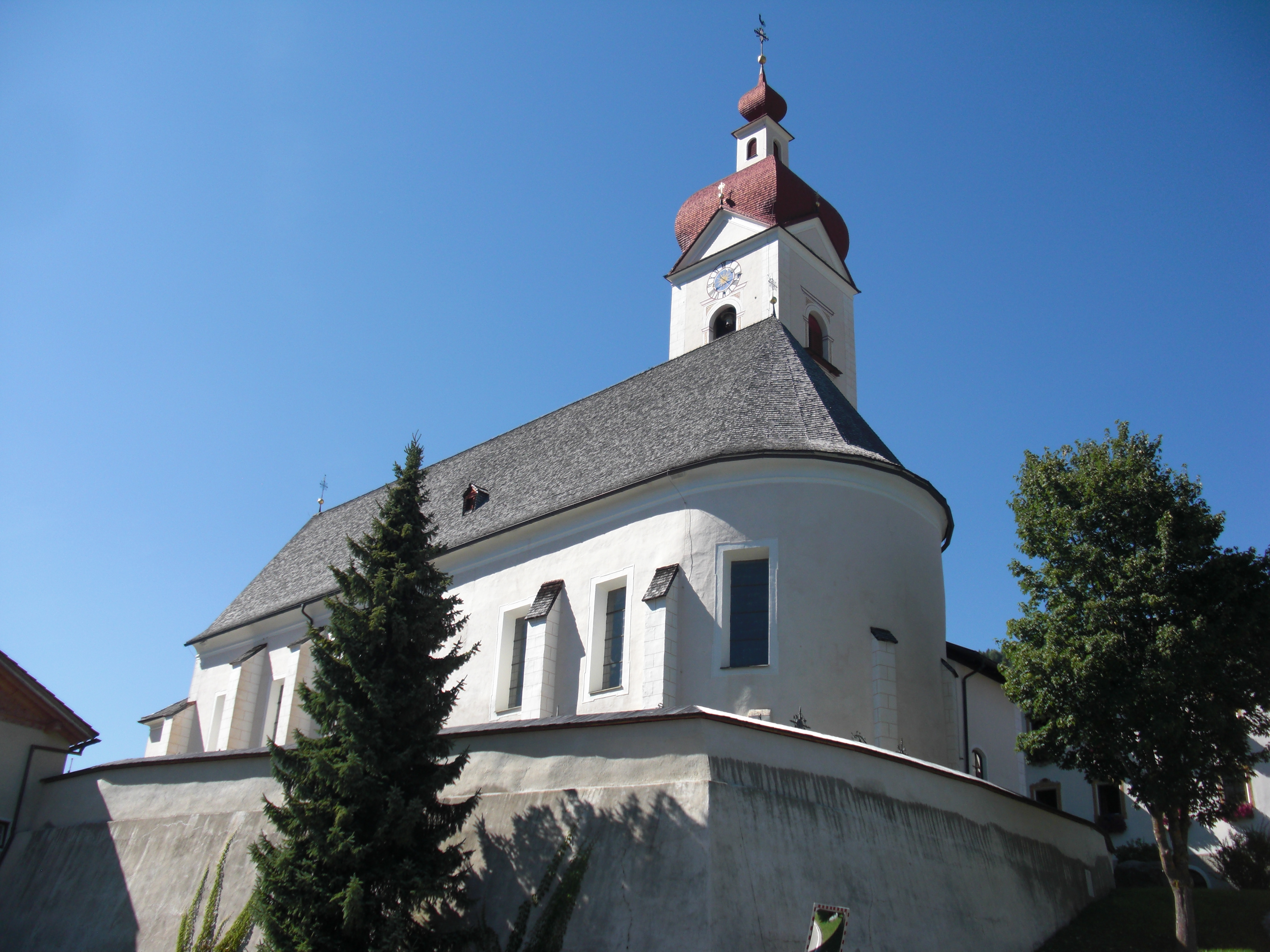 Kath. Pfarrkirche Hl. Dreifaltigkeit in Unteraßling, Osttirol (Österreich).